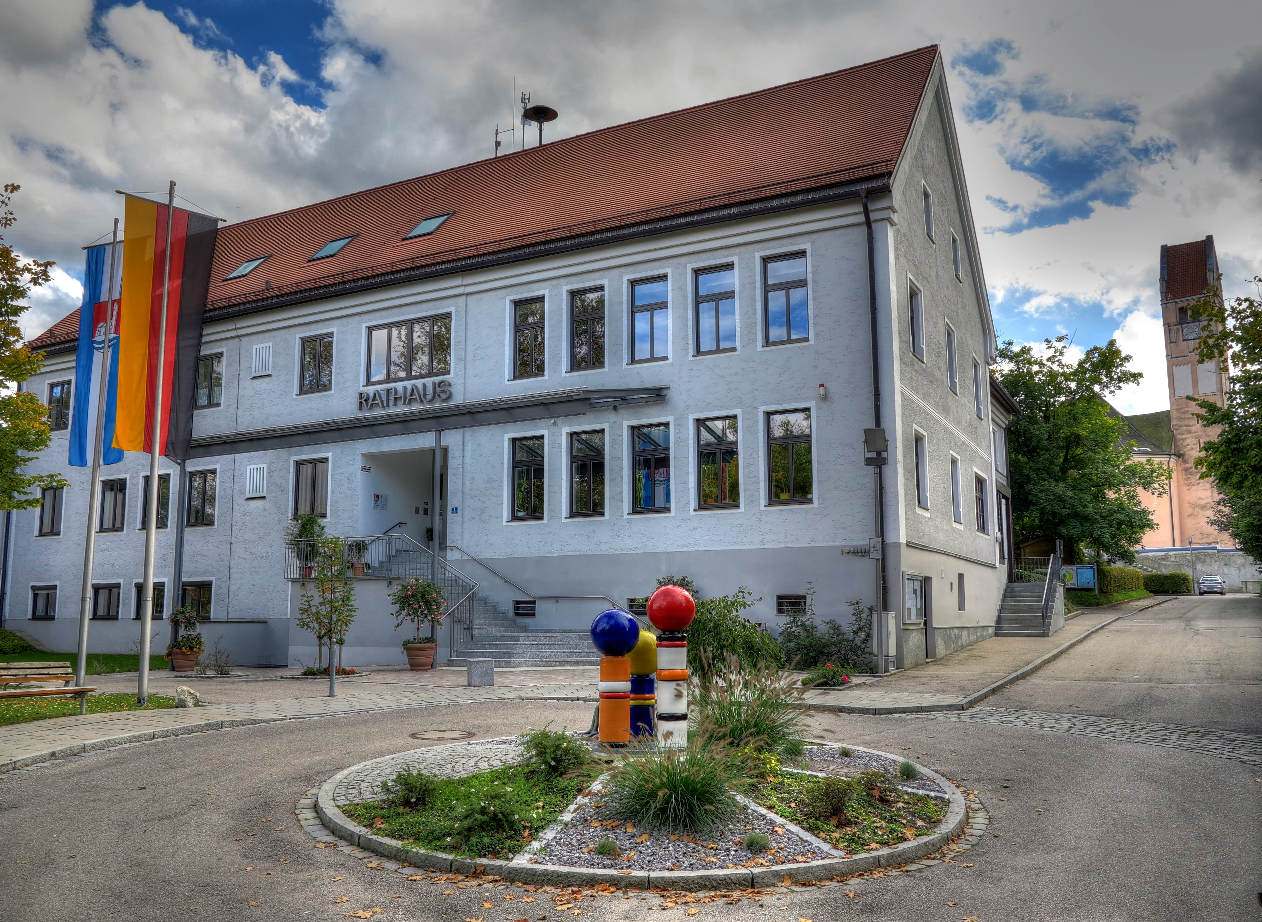 Deutschland, Bayern, Oberbayern, Landkreis Dachau, Gemeinde Bergkirchen, Rathaus, im Hintergrund die kath. Kirche Johann Baptist